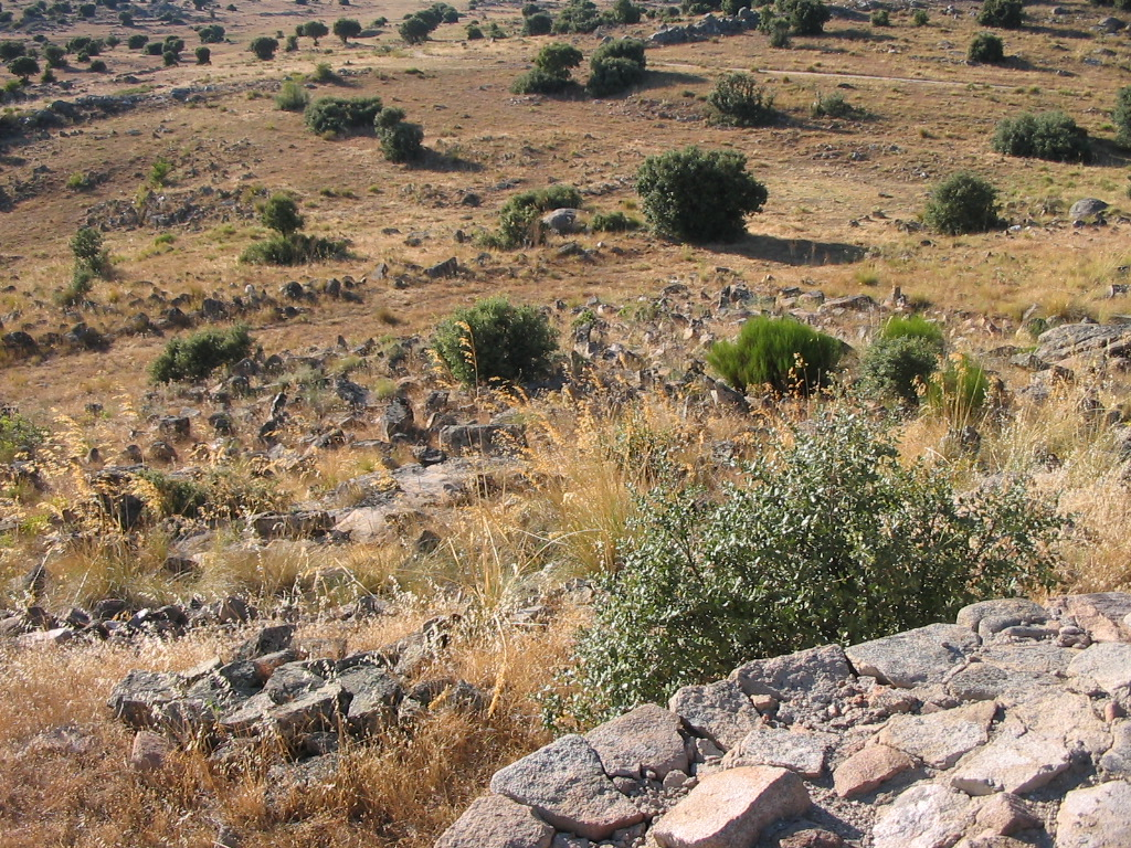 Castro de Las Cogotas (Ávila, España). Campo de piedras hincadas visto desde la muralla.